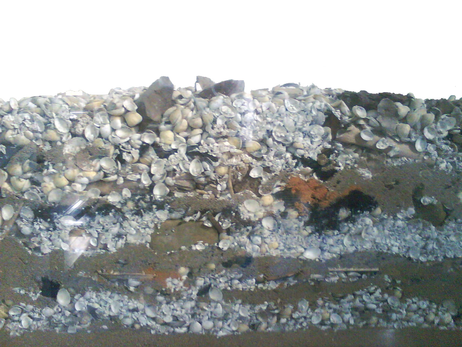 Fotografia de um modelo de extratificação das camadas de um sambaqui do litoral sul catarinense.